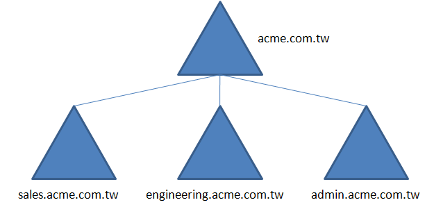 Active Directory 網域樹範例。